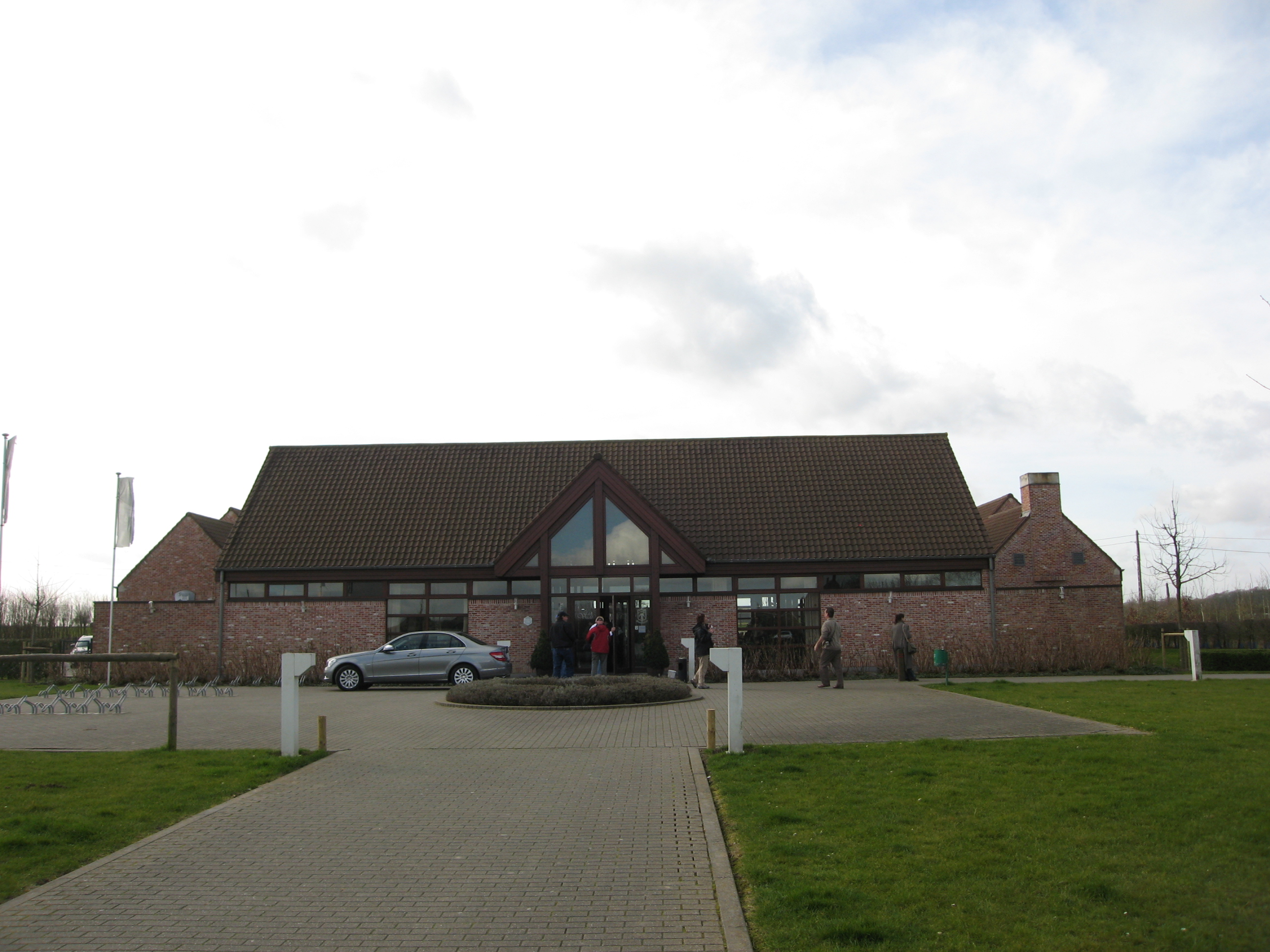 In de Vrede, cafè en bezoekerscentrum Abdij van Westvleteren